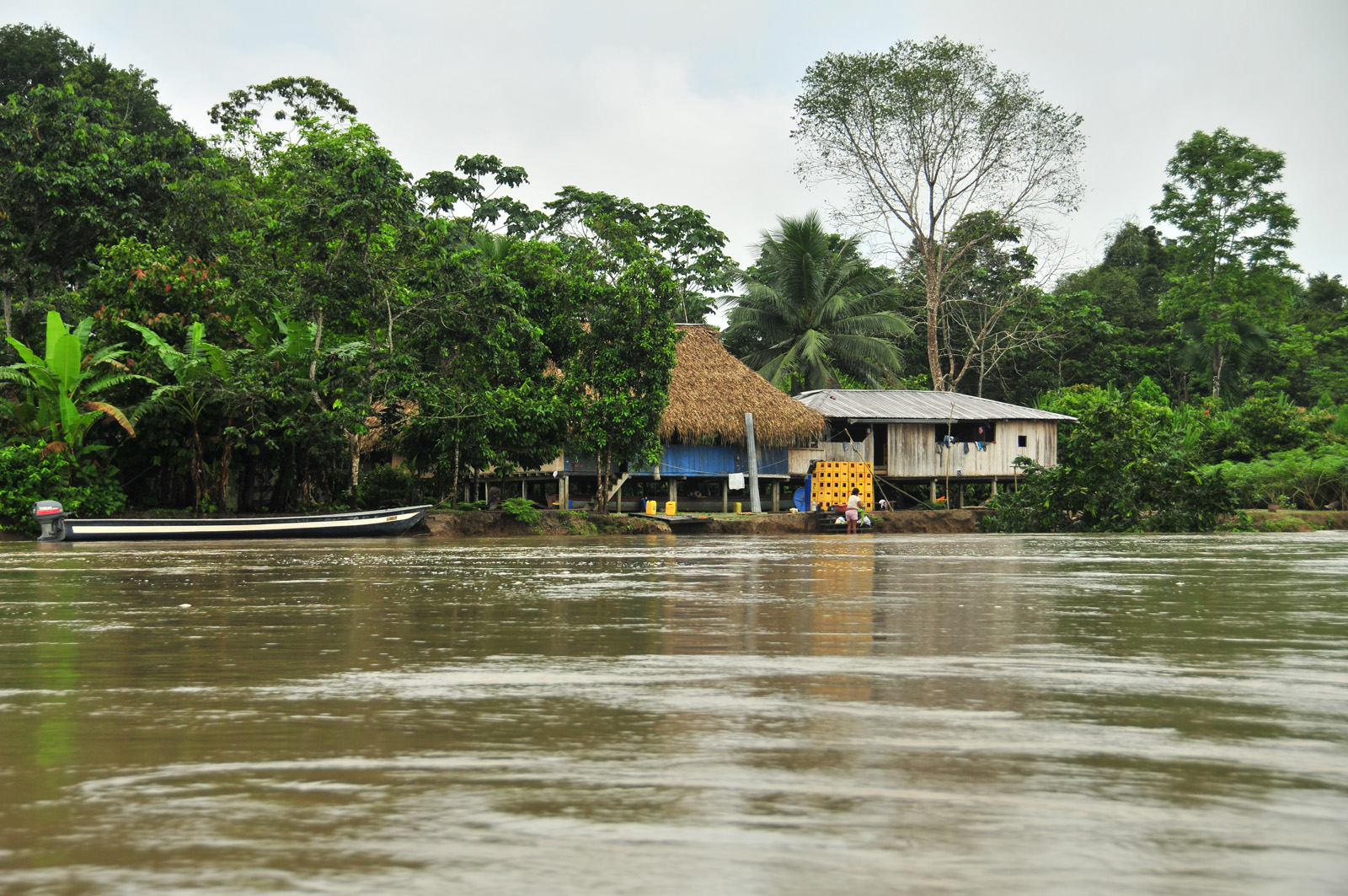 Poblaciones en el río Napo